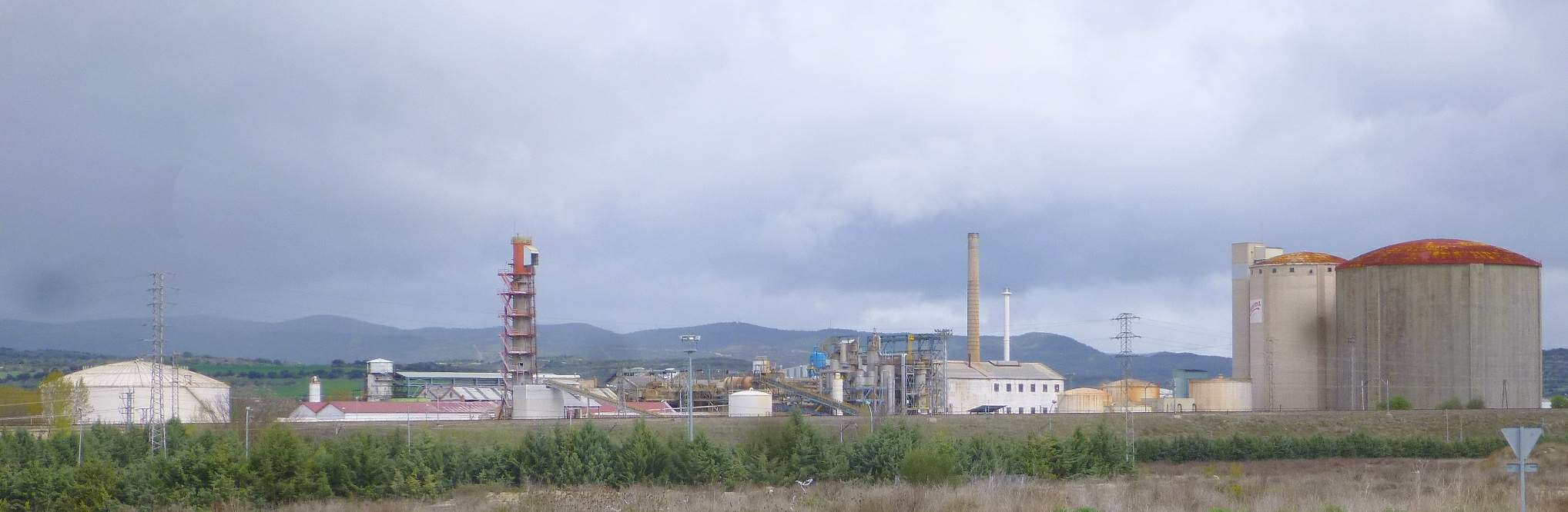 Azucarera de Miranda de Ebro (Burgos)